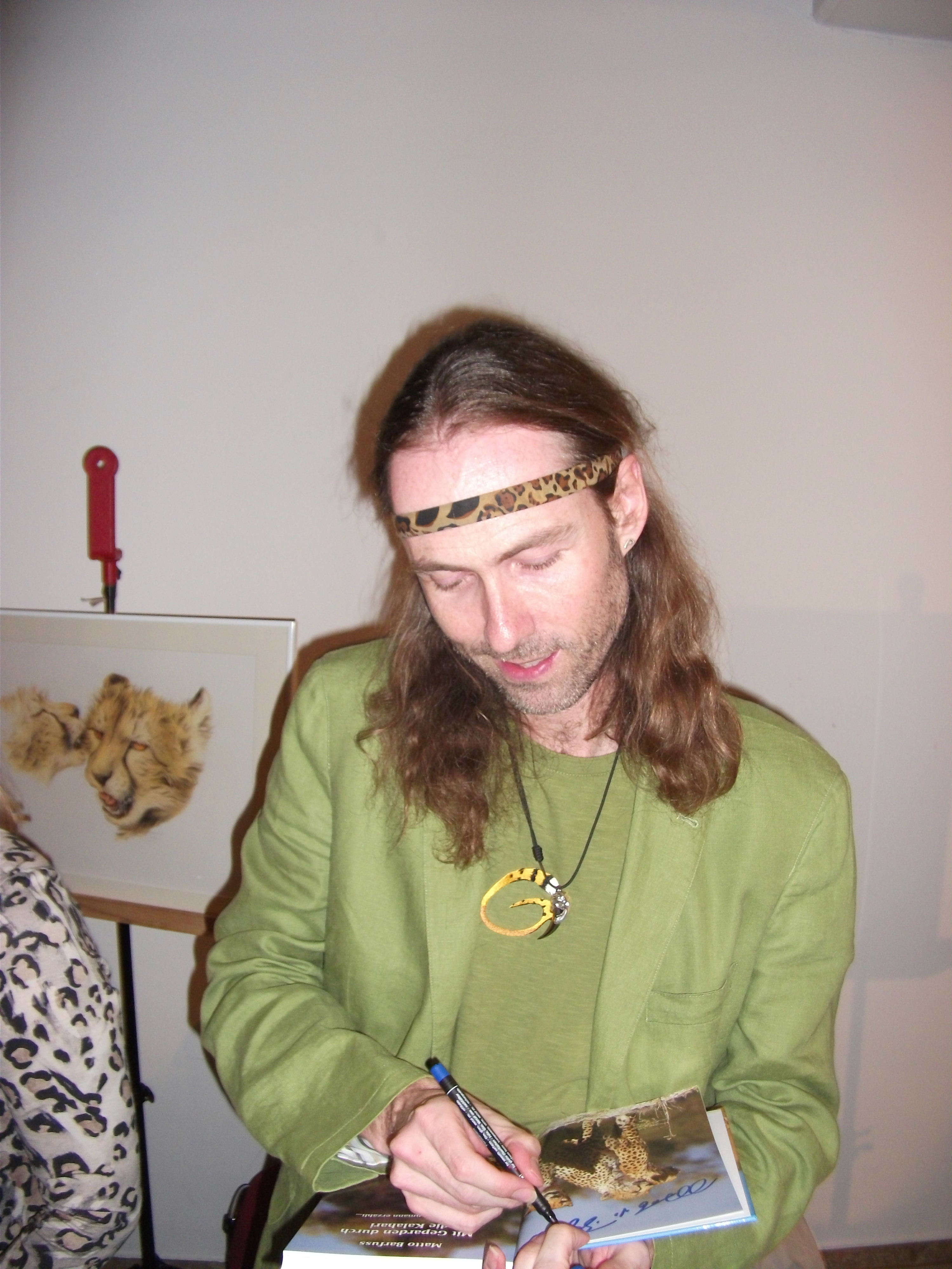 Matto Barfuss, geboren als Matthias Huber, in den Medien auch "Gepardenmann", beim Signieren eines Buches anlässlich einer Tonbildschau in Ludwigshafen-Oggersheim